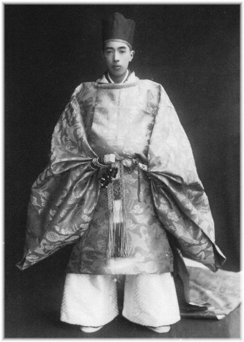 山階宮武彦王、未成年用の装束を着用。